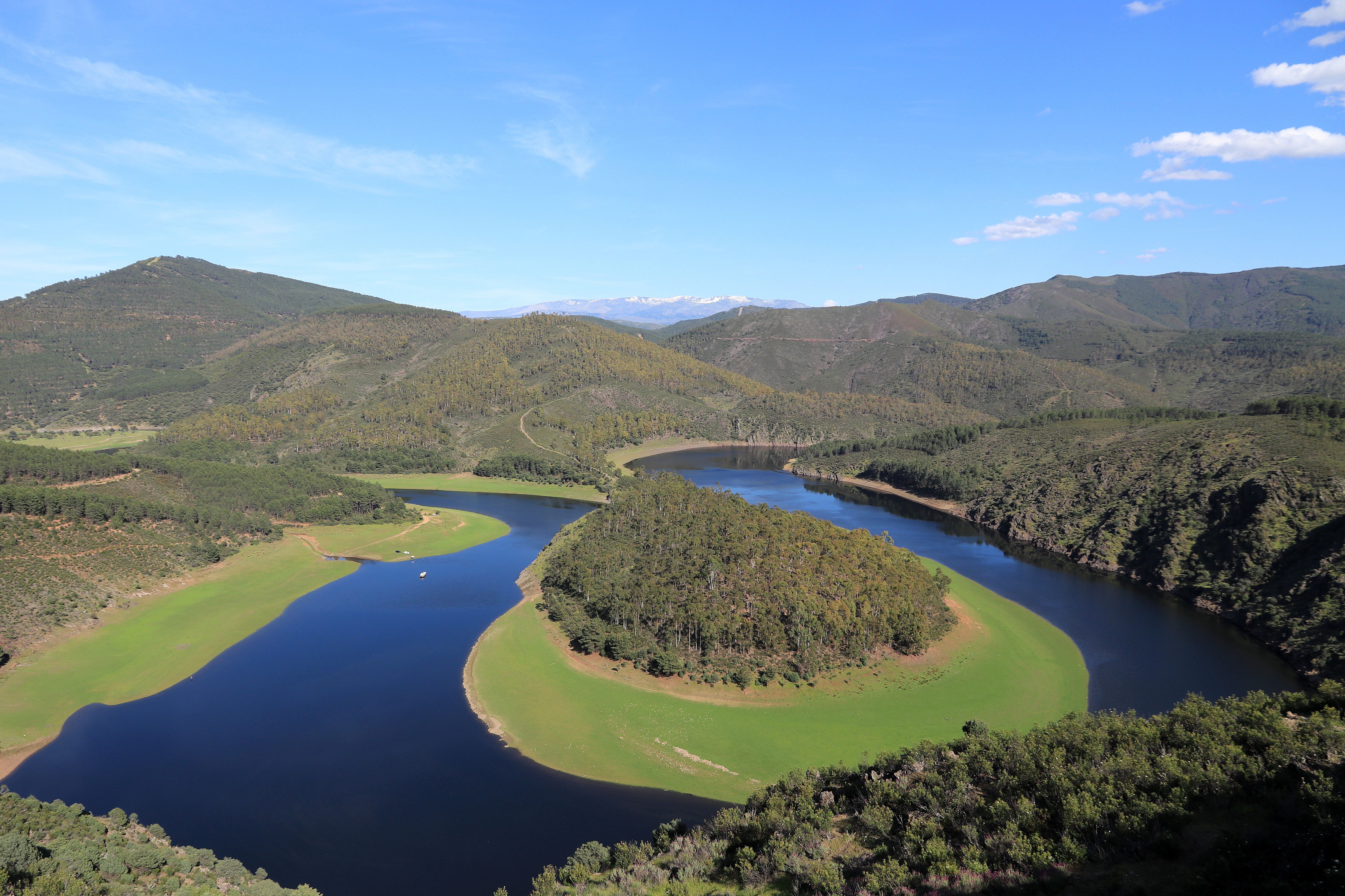 Las Hurdes constituyen un espacio natural situado al norte de la provincia de Cáceres, en la vertiente meridional de la Sierra de Francia (sector occidental del Sistema Central Español). Se caracteriza por un relieve abrupto, desarrollado en materiales paleozoicos, fundamentalmente metasedimentarios. La red fluvial realiza un fuerte encajamiento en este sustrato dando lugar a espacios singulares de alto valor paisajístico y ecológico. This is a photography of a Special Area of Conservation in Spain with the ID: ES4320011. Natura2000 entry, EEA entry